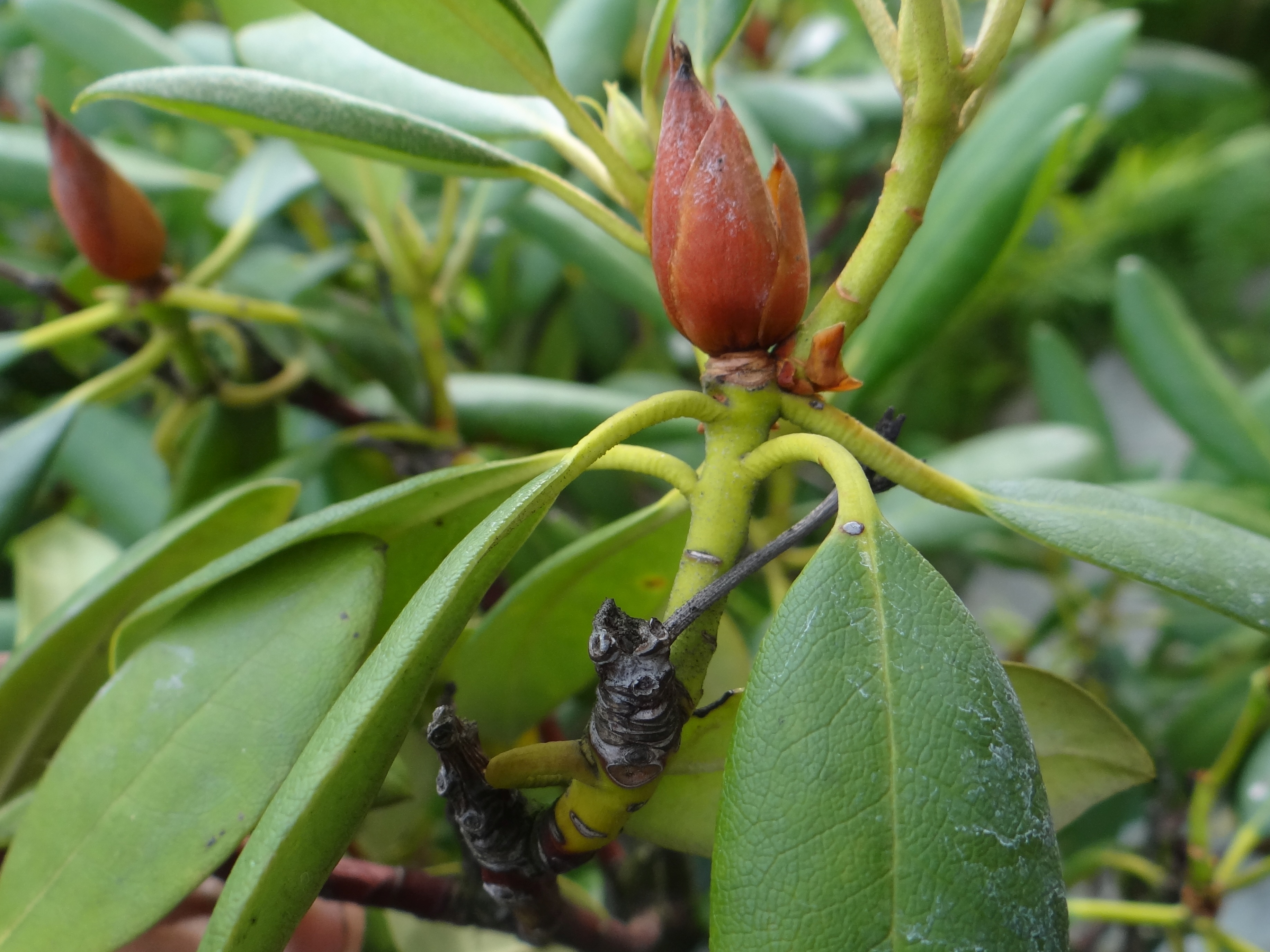 Seifertia azaleae on Rhododendron catawbiensis